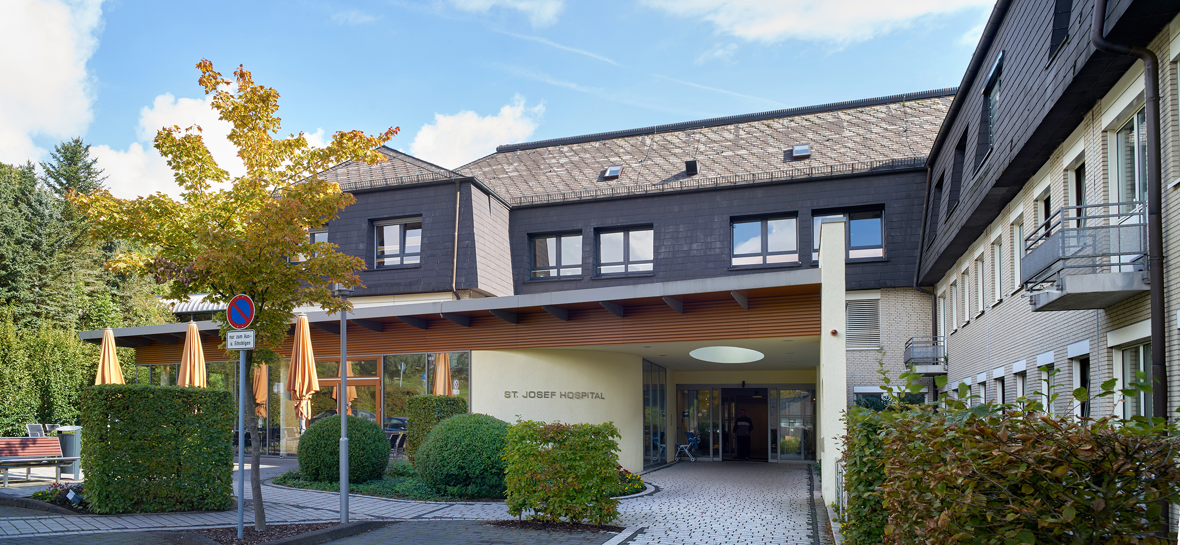 St. Josef Hospital Bad Driburg 2017